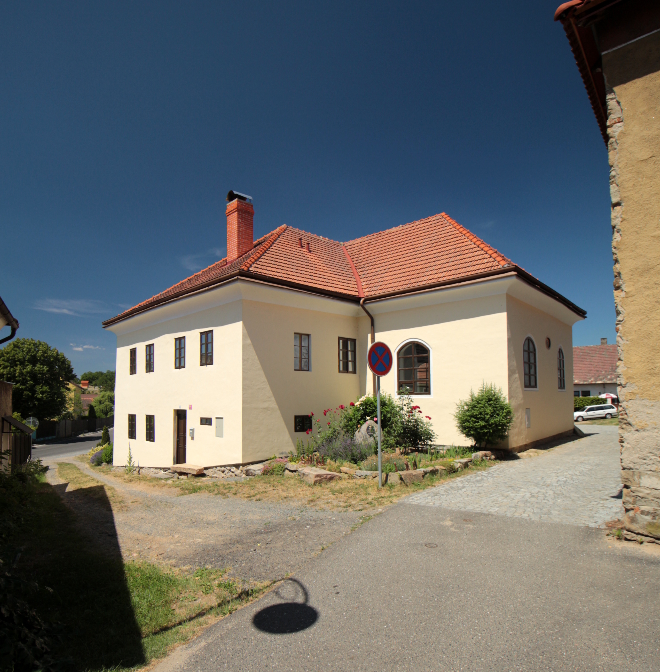 Kosova Hora, židovská čtvrť